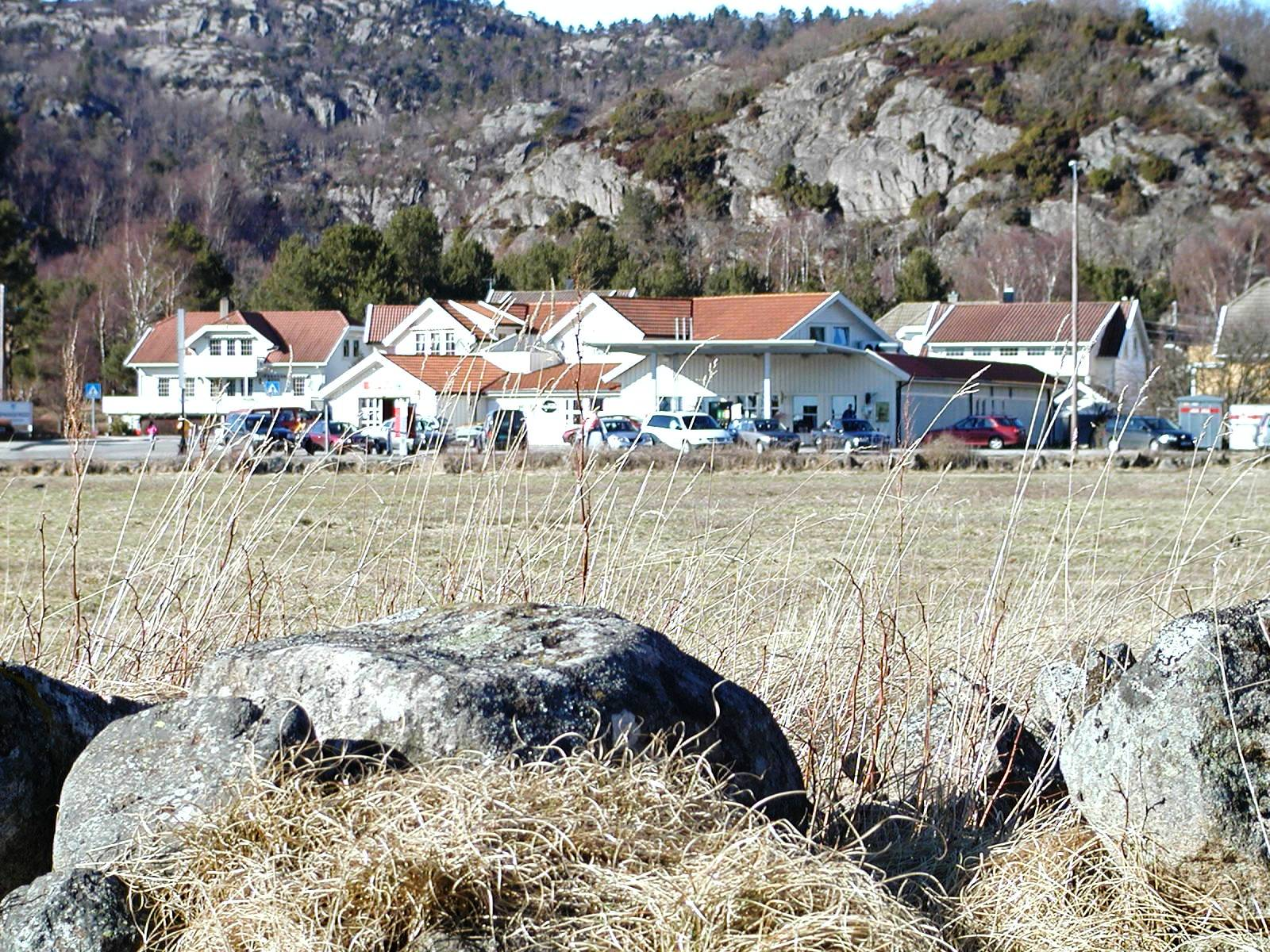 Spangereid-Høllen (Norwegen); selbst aufgenommen in 2006 durch Kantor.JH.